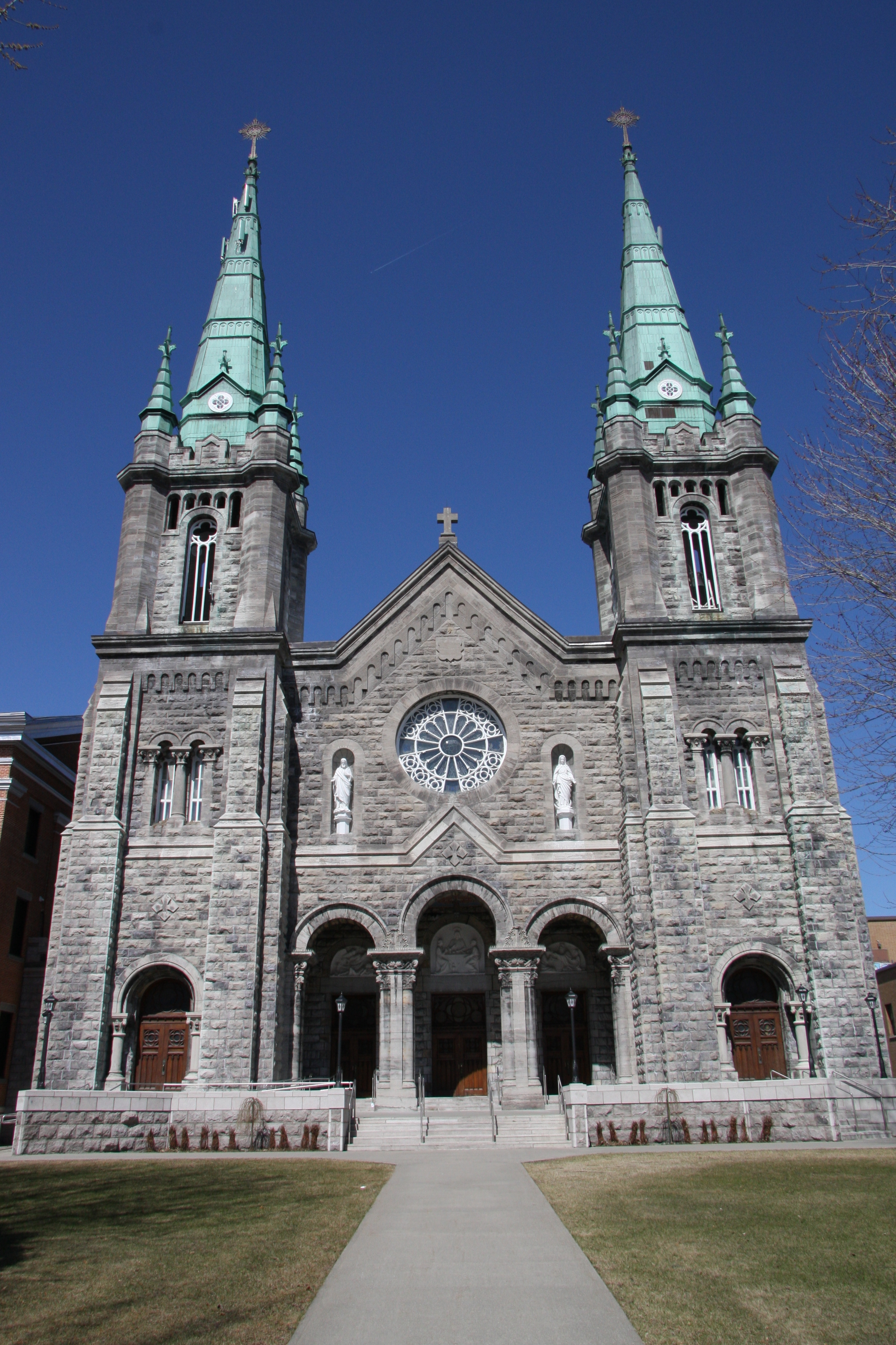 Cathédrale de Saint-Hyacinthe, Québec, Canada.